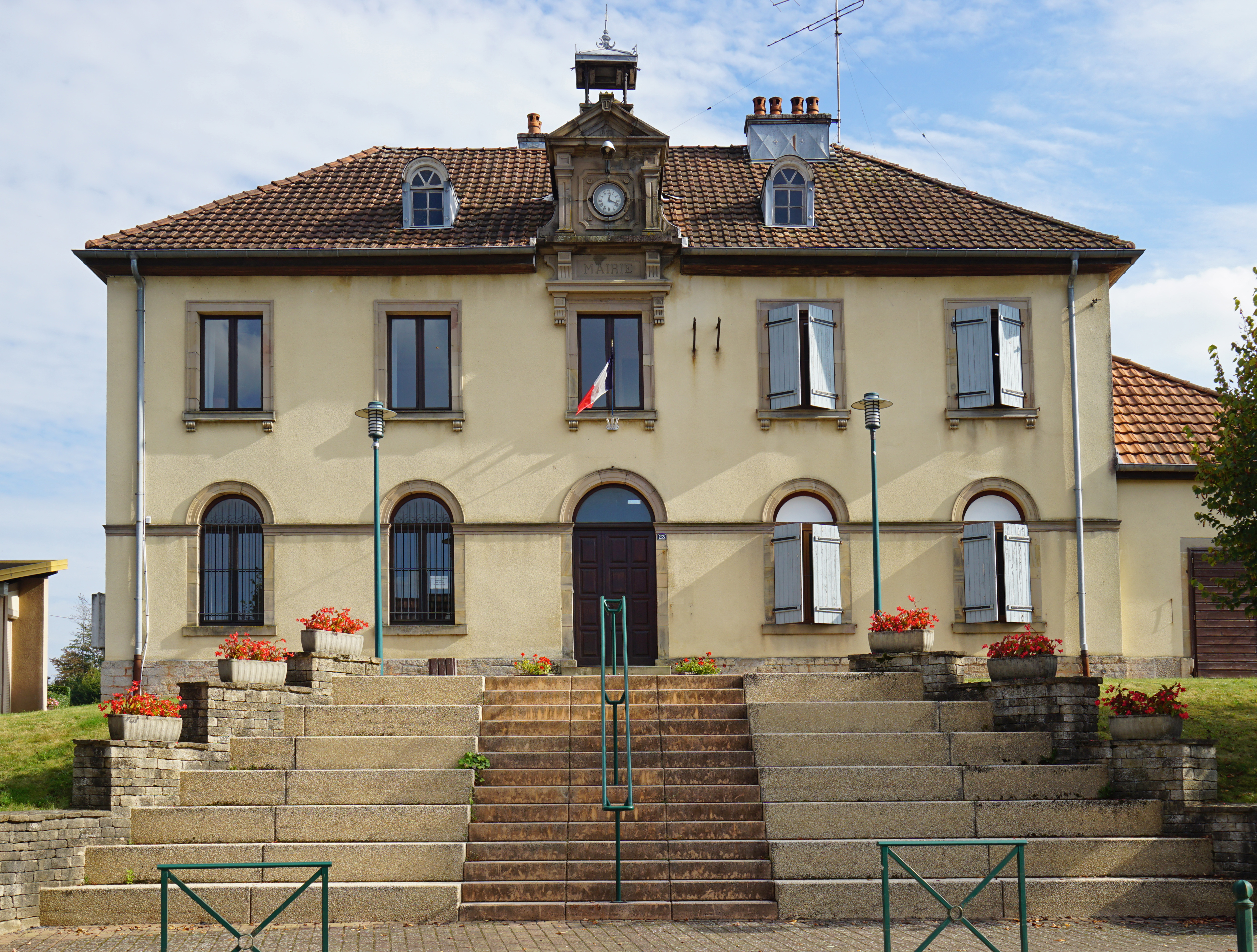 Mairie de Tavey.